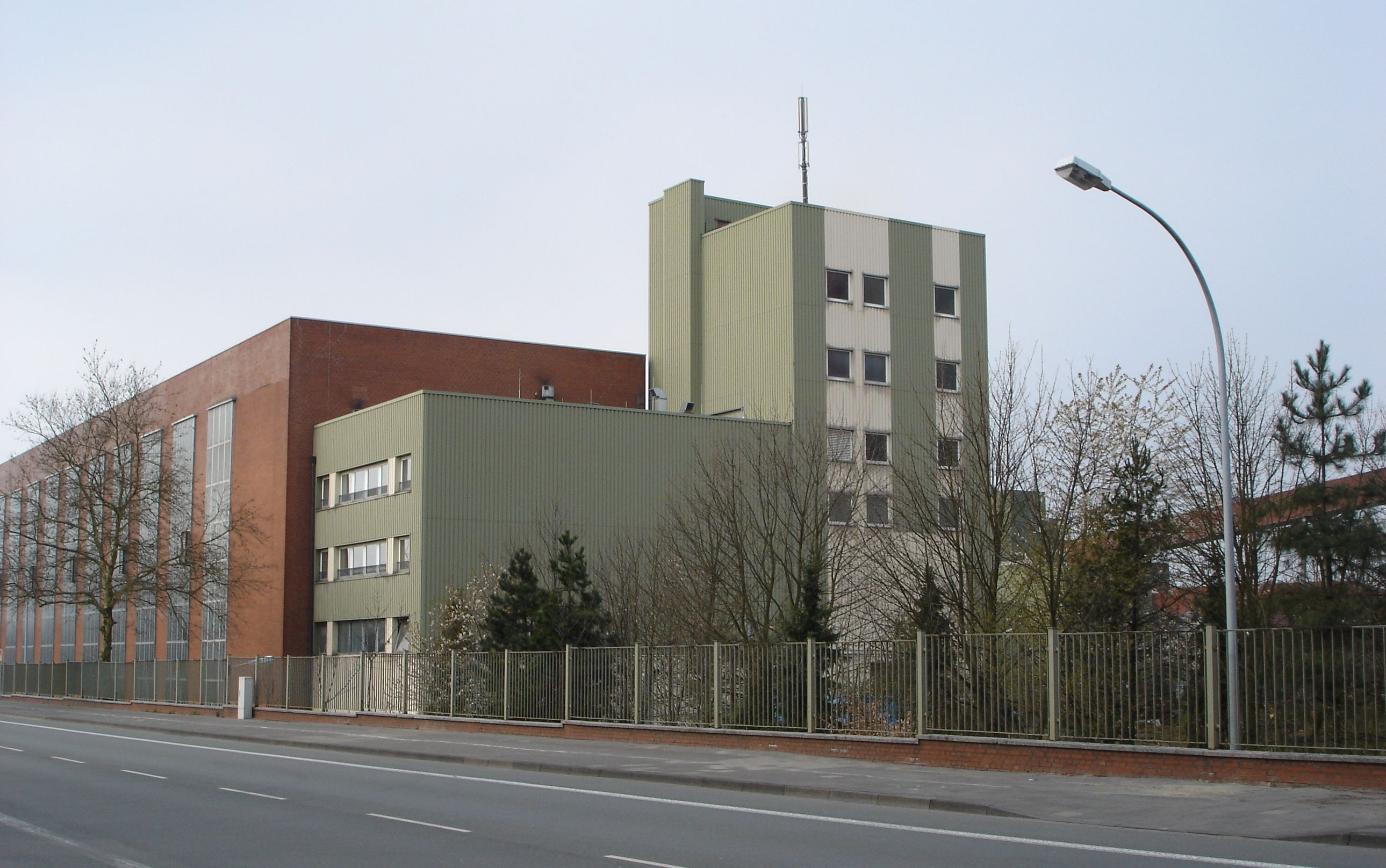 Ibbenbüren, Blick auf den Standort das ehemaligen Kraftwerks Block A. Das mit Wellblechplatten verkleidete Gebäude ist der ehemalige Verbindungstrakt zwischen dem alten Ballastkraftwerk und dem Block A.